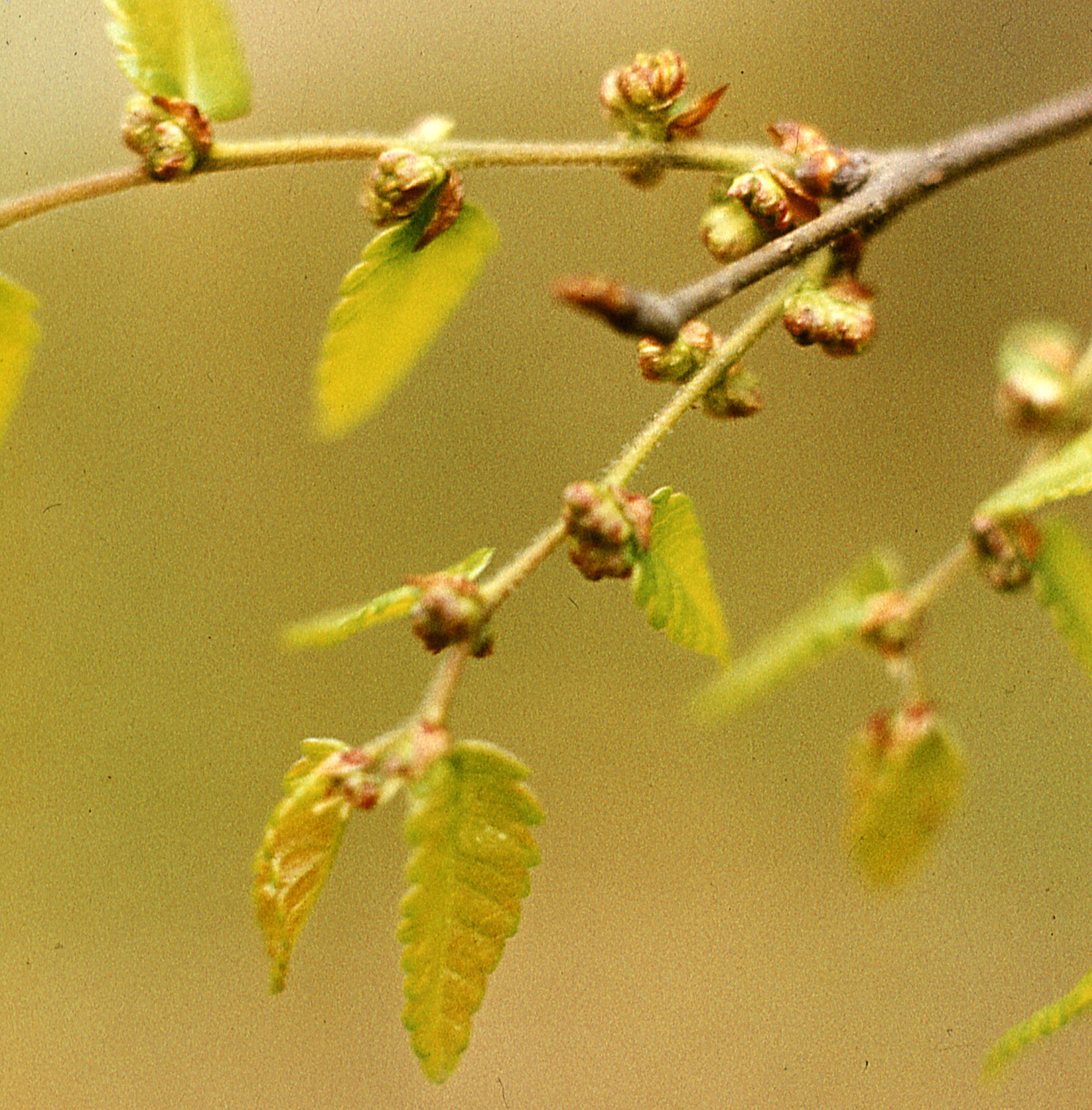 Цветови кавкаске зелкове, Арборетум, Београд (аутор: Михаило Грбић).